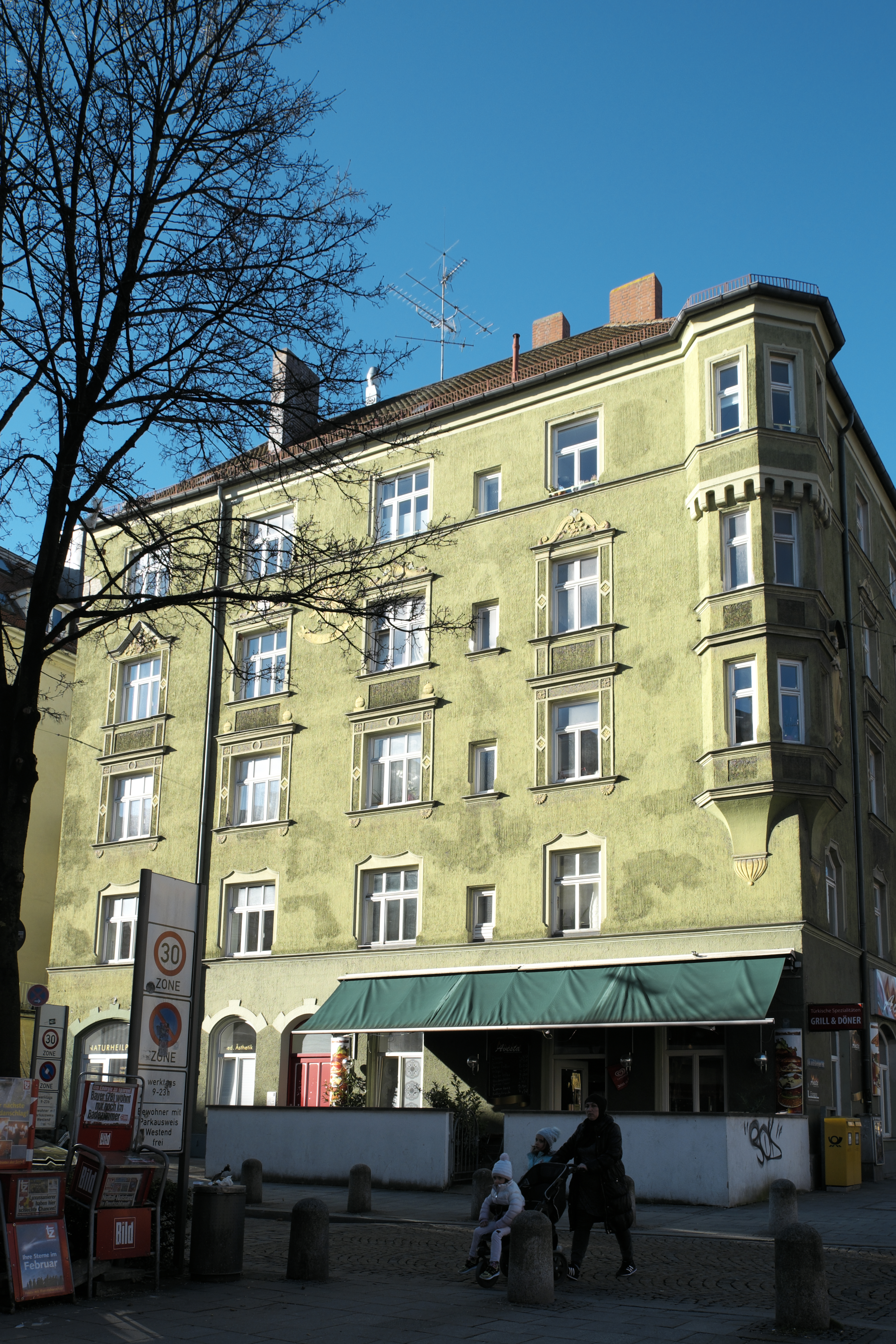 Mietshaus in der Landsberger Straße 129 im Stadtbezirk Schwanthalerhöhe in München (Bayern/Deutschland)